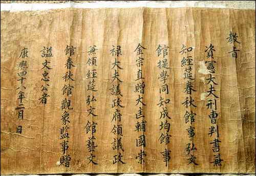 김종직 증직 교지